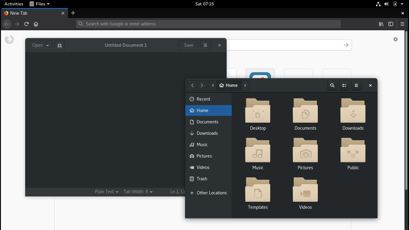 Gnome 3.22.2 with nautilus, gedit and firefox running